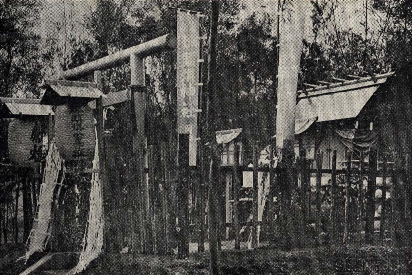 中文（台灣）: 位於現今雲林縣西螺鎮廣興國小內